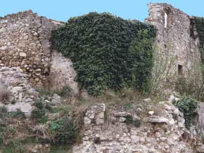 Llers, Gerona, España, Ruinas del castillo donde supone tuvo lugar la leyenda del conde Estruc